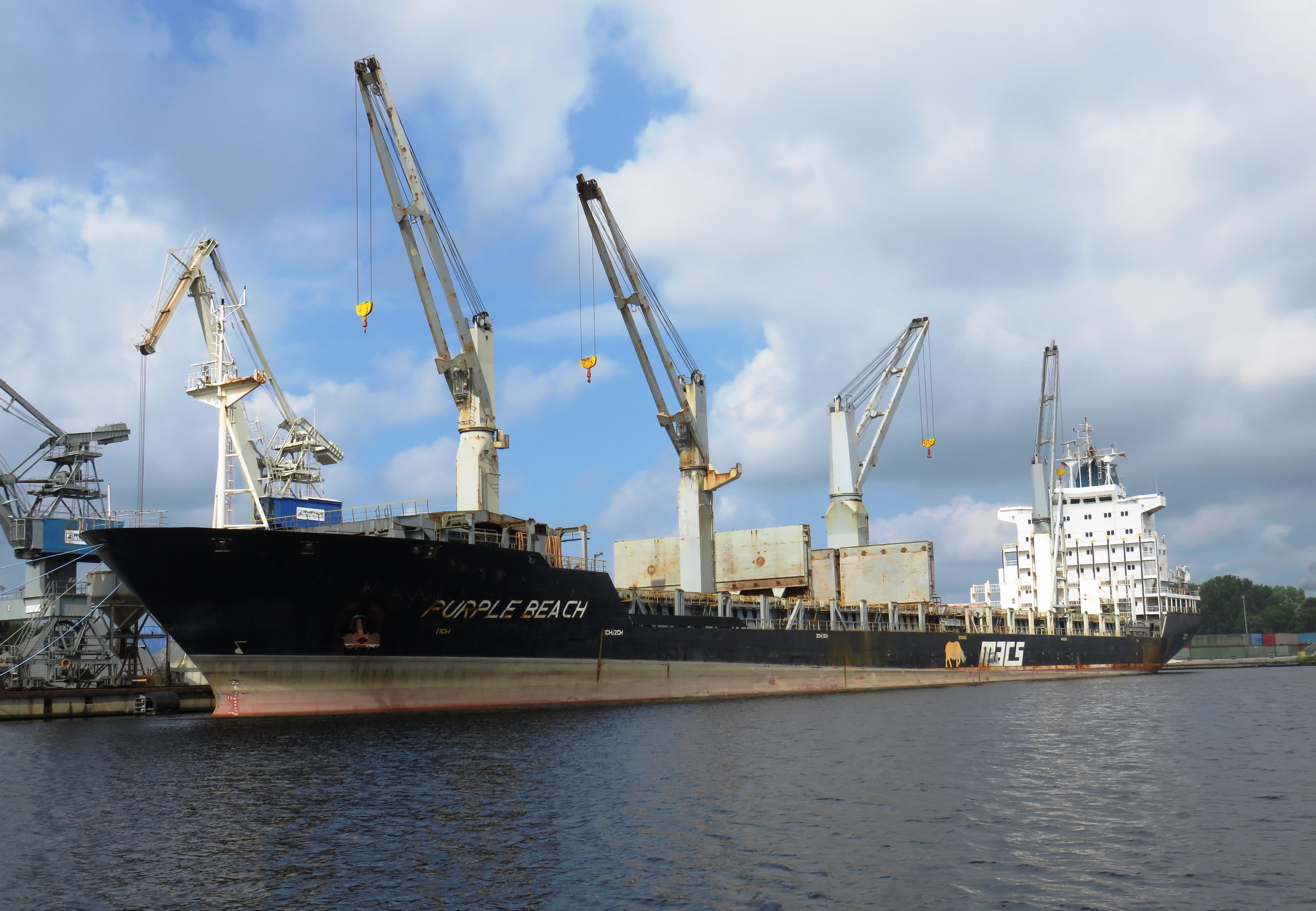 Die Ladung der Purple Beach wird nach der Havarie am Wilhelmshavener Lüneburgkai gelöscht